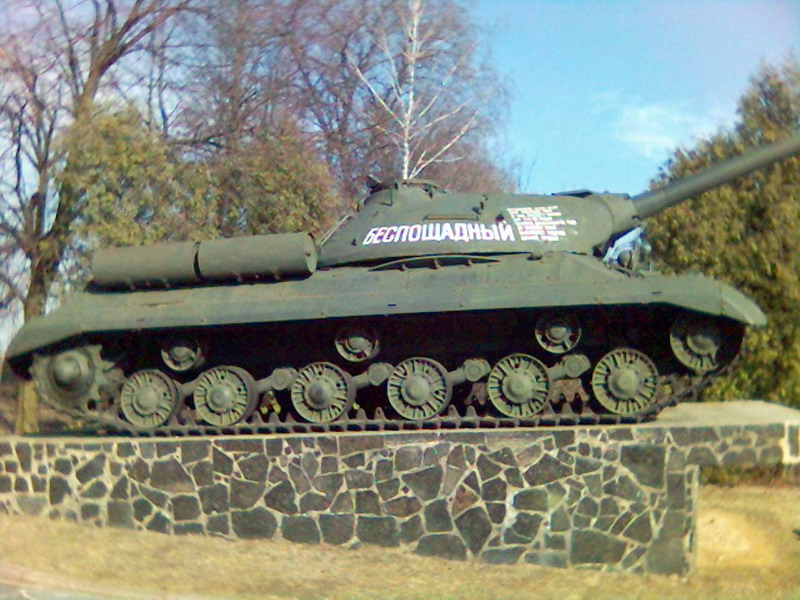 Пам'ятник екіпажу танку «Безпощадний»